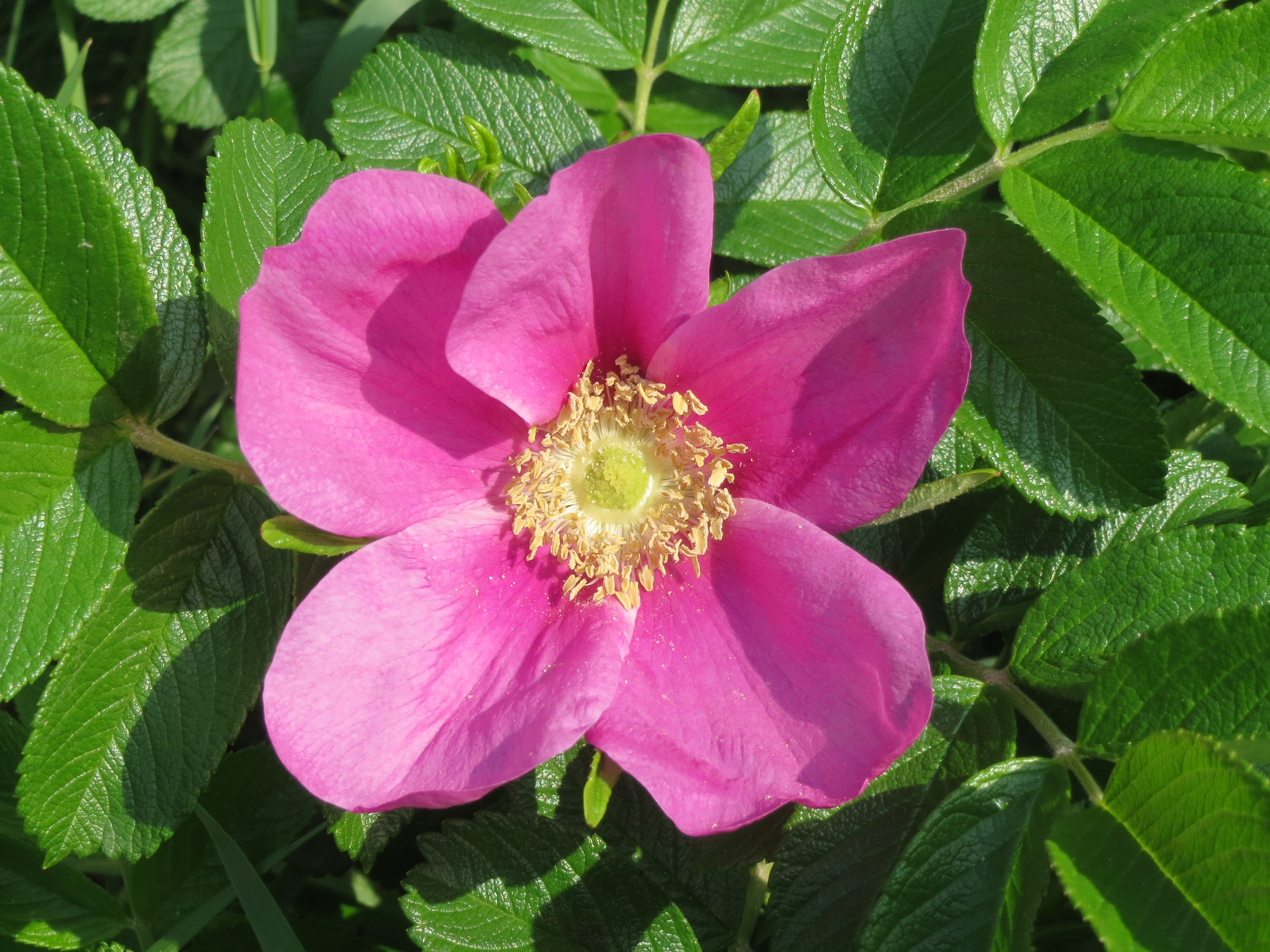 Kartoffel-Rose (Rosa rugosa) bei Reilingen